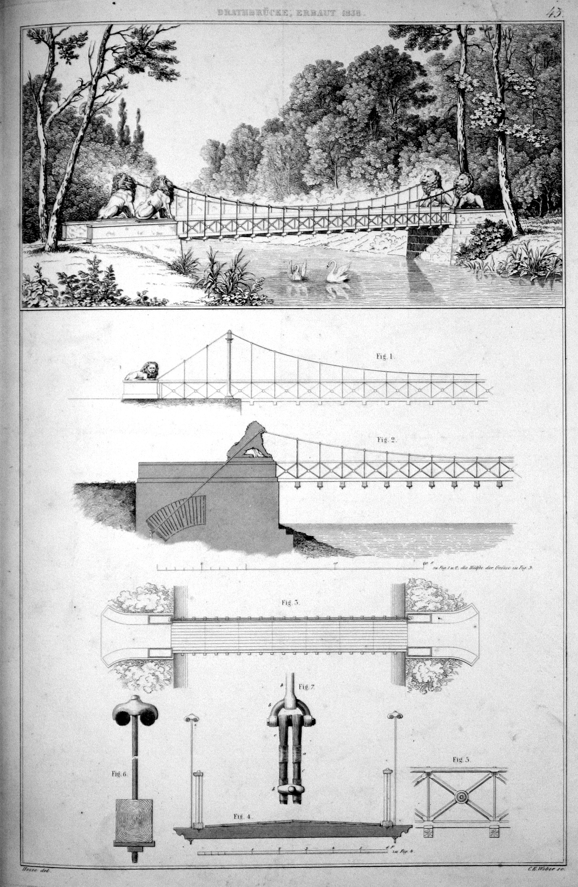 Berlin - Löwenbrücke, Entwurfszeichnungen von Ludwig Ferdinand Hesse